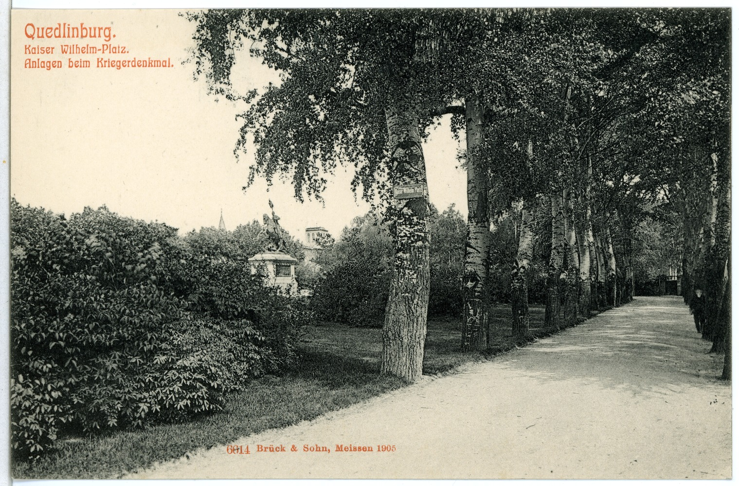 Quedlinburg; Kaiser-Wilhelm-Platz - Kriegerdenkmal This postcard is from publisher Brück & Sohn in Meißen ( This postcard has a unique number 06614 and is available in a higher resolution at the publisher. This images was uploaded in a cooperation project between Wikipedians and the publisher.